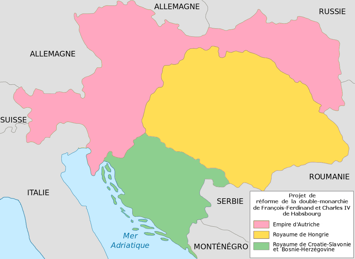 Projet de réforme de l'archiduc François-Ferdinand et de l'empereur-roi Charles IV de Habsbourg, d'après Christopher M. Clark, Les Somnambules : été 1914, comment l'Europe a marché vers la guerre, Paris, Flammarion, 2013, ISBN 978-2-08-121648-8, page 120.